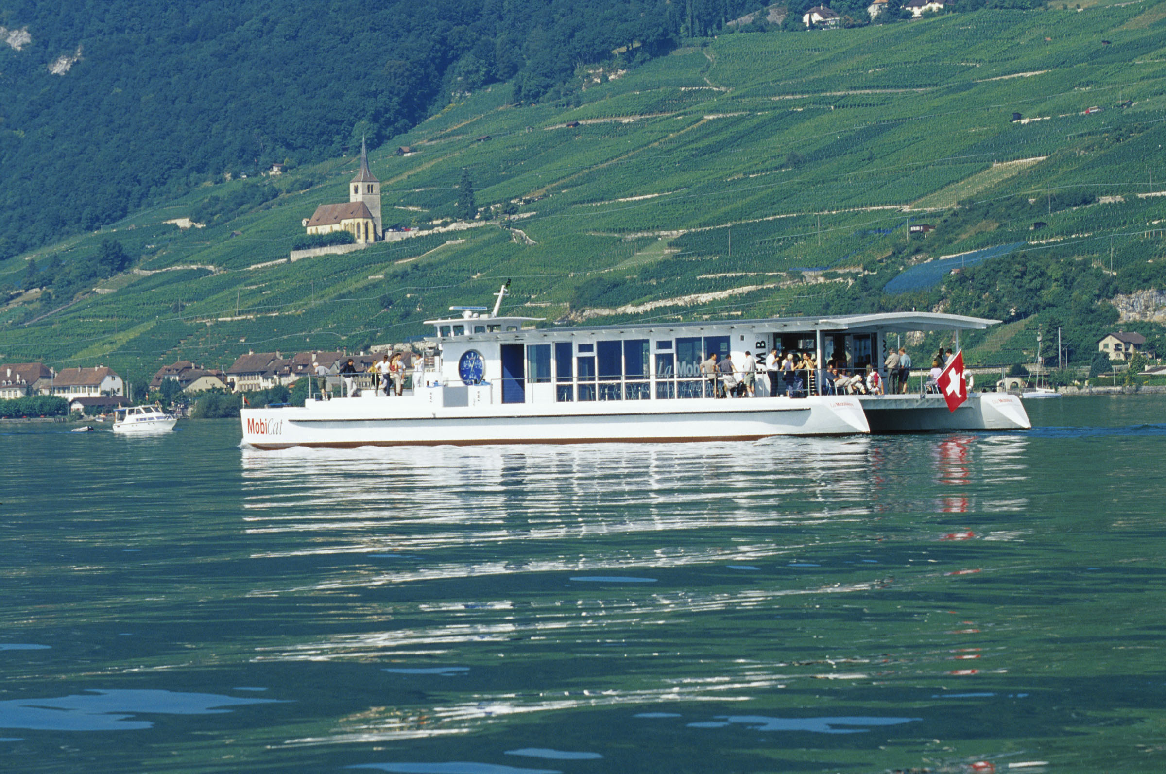 Solarkatamaran MobiCat